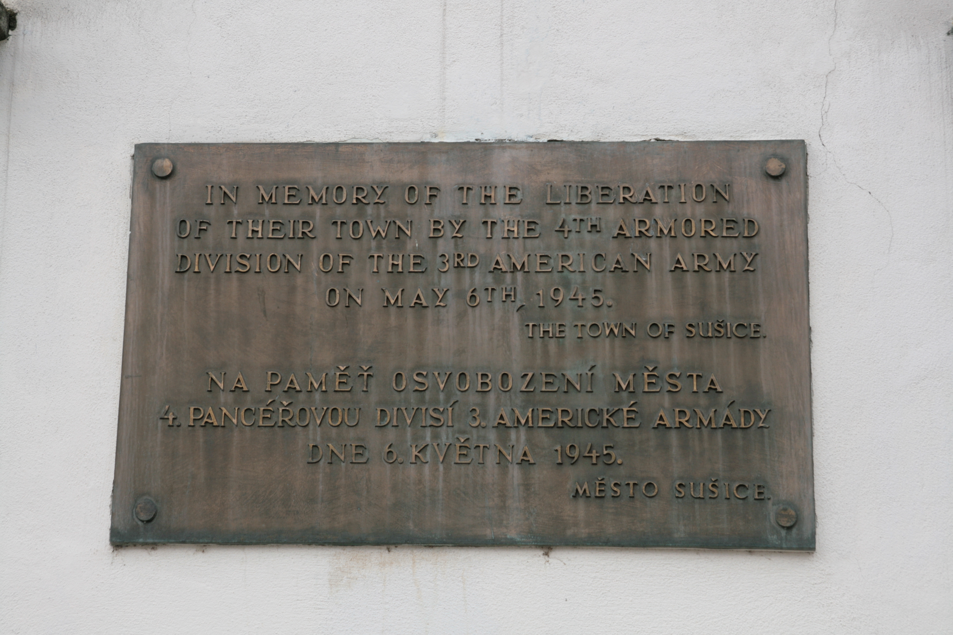 Město Sušice v okrese Klatovy. Voprchovský dům, čp. 40 na náměstí Svobody, sídlo Muzea Šumavy.